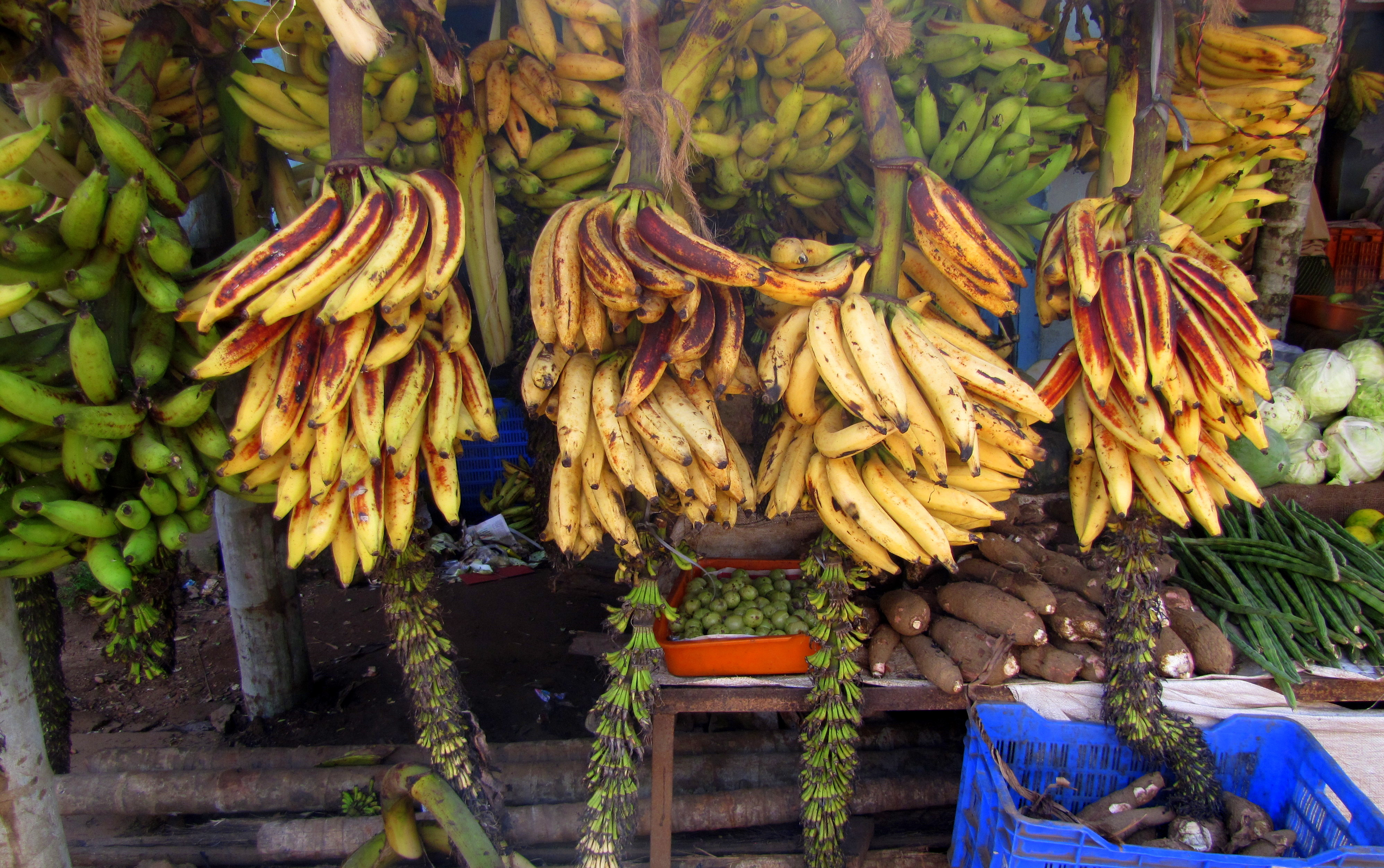 കാഴ്ചക്കുല